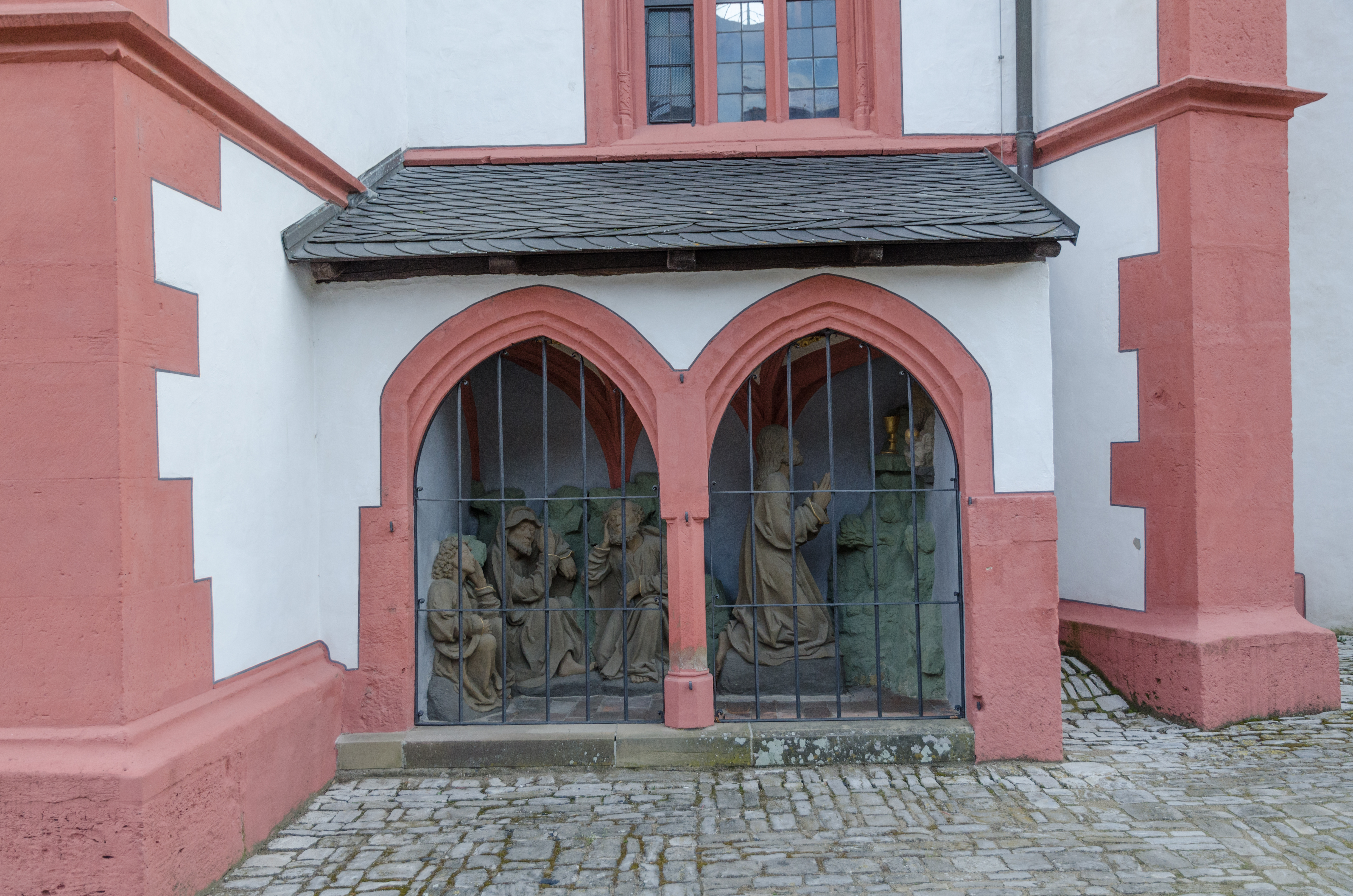 Frickenhausen, St. Gallus, Exterior, Ölbergkapelle